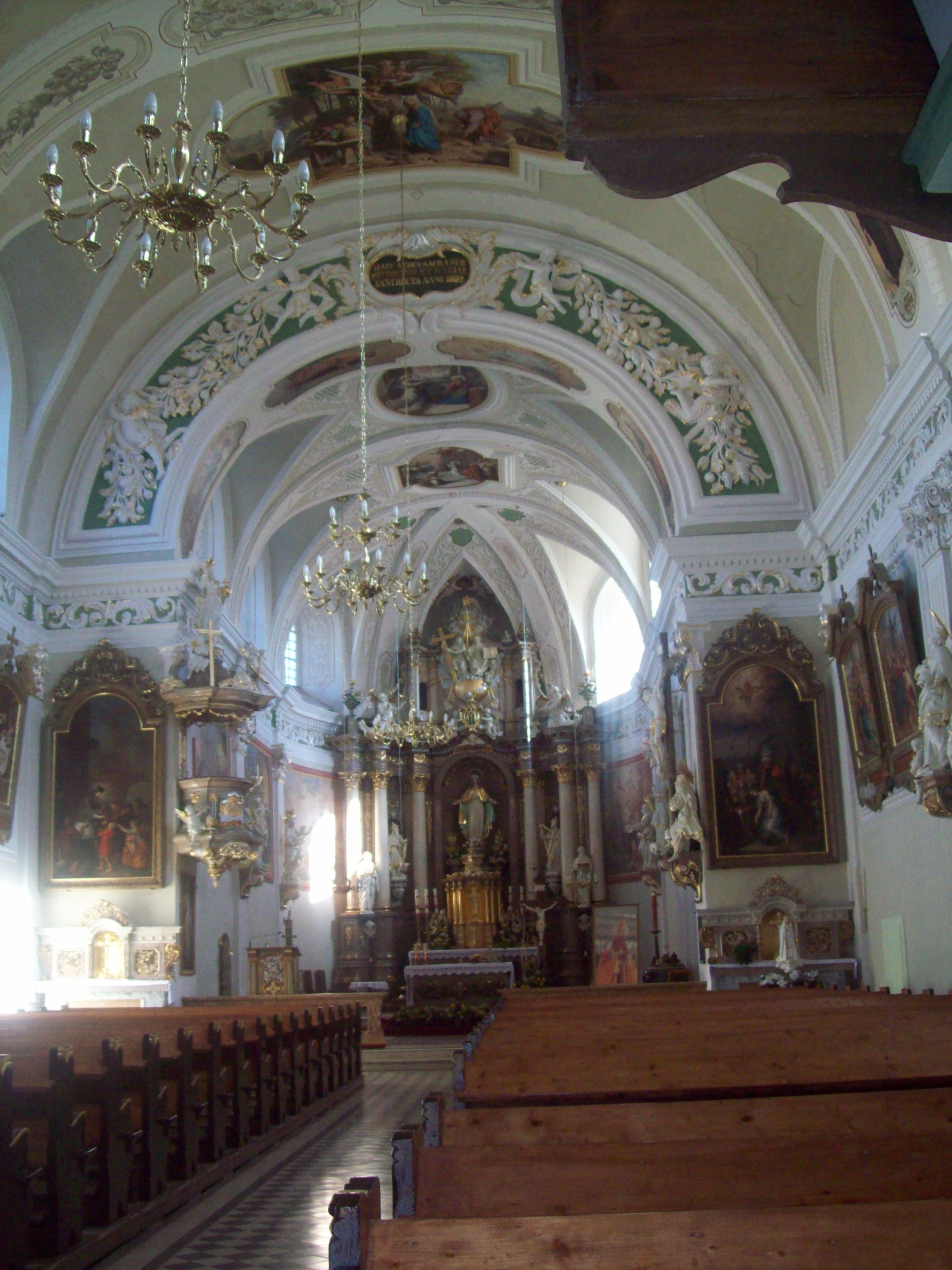 Nawa główna w lądeckim kościele